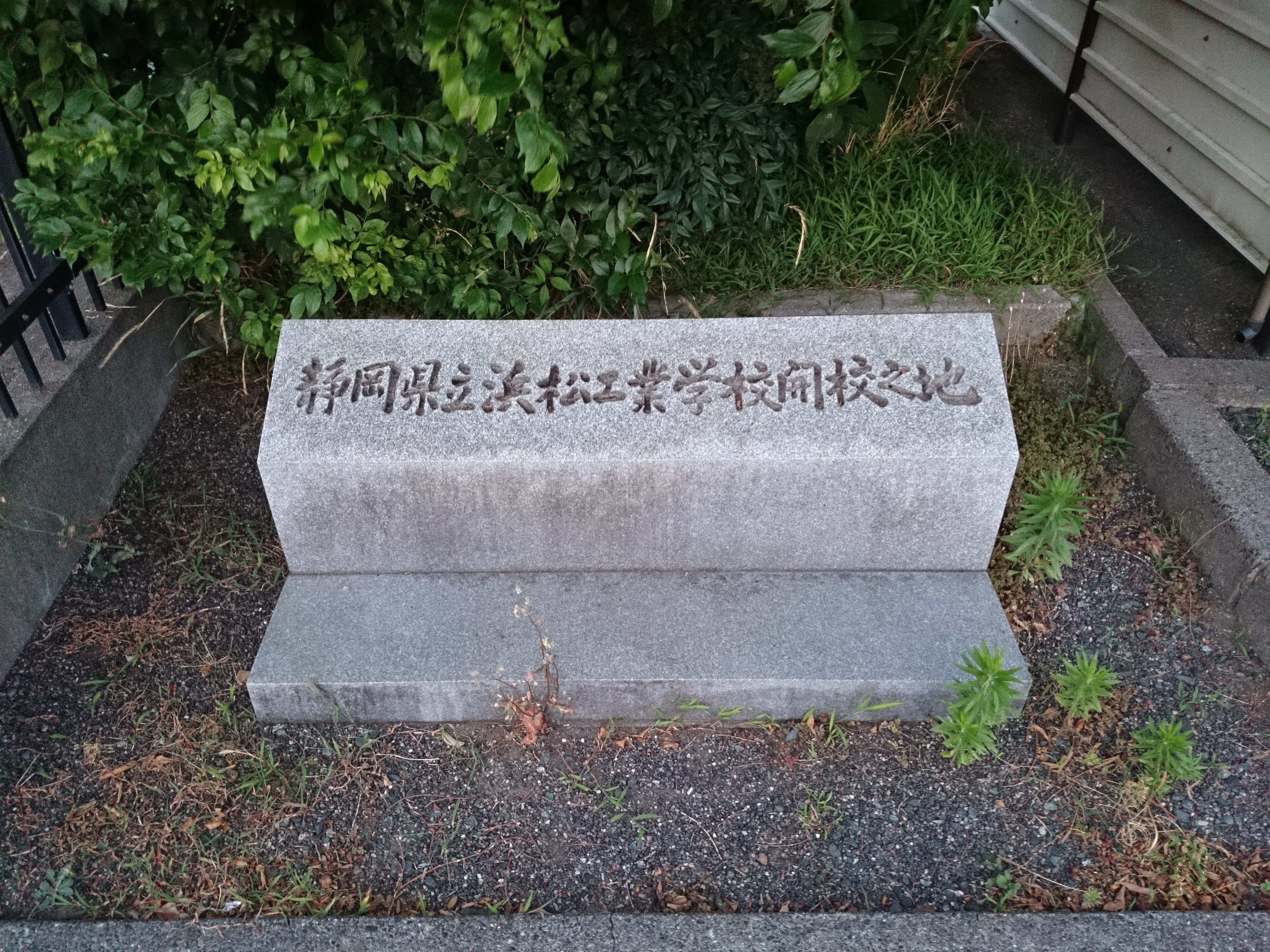 静岡県立浜松工業高等学校（移転前跡地） 開校記念碑